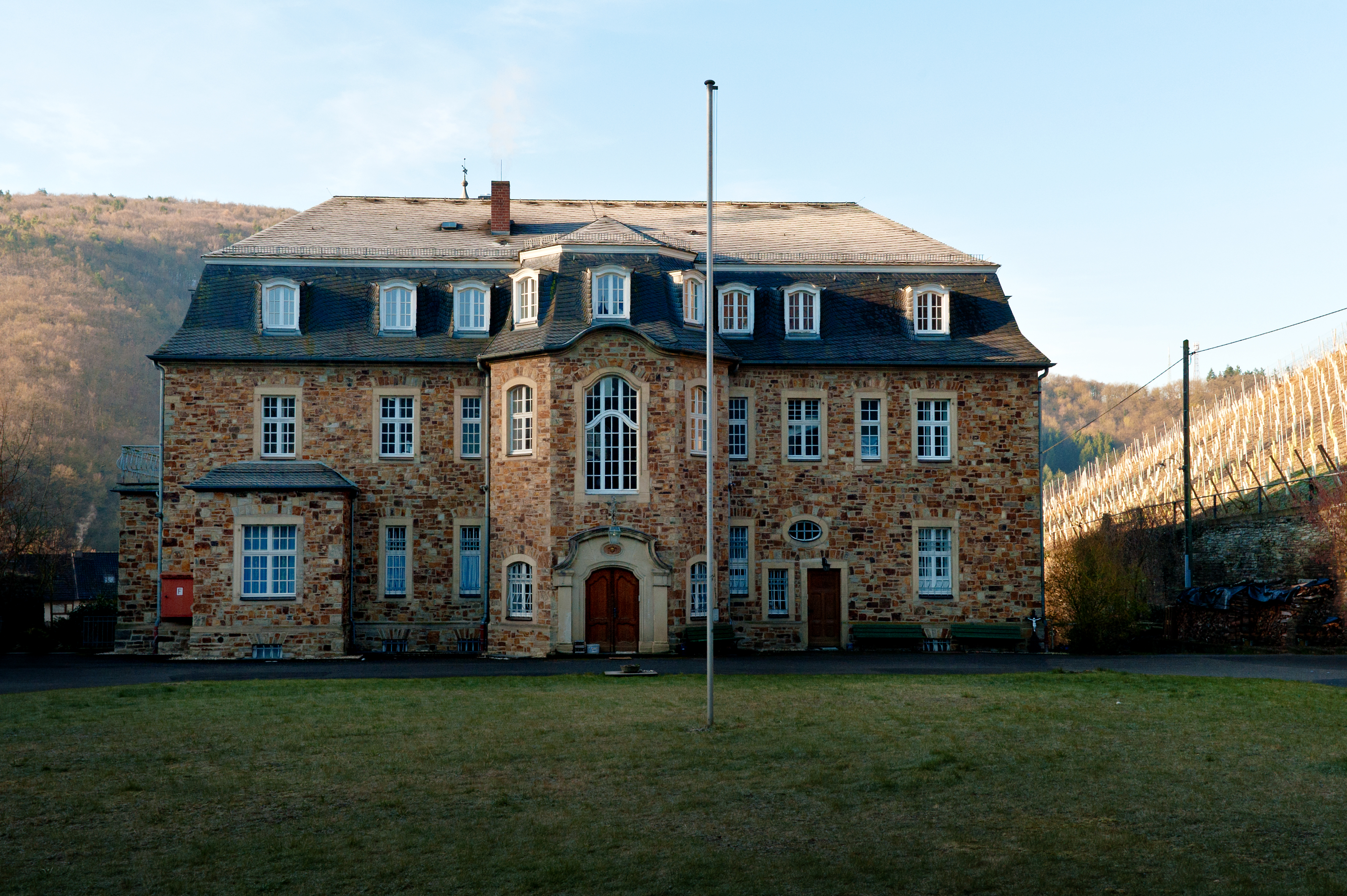 Klosterstraße 3-5, 53507 Dernau, Deutschland weingut-kloster-marienthal.de